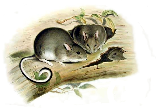 Conilurus albipes (orig. Hapalotis albipes)